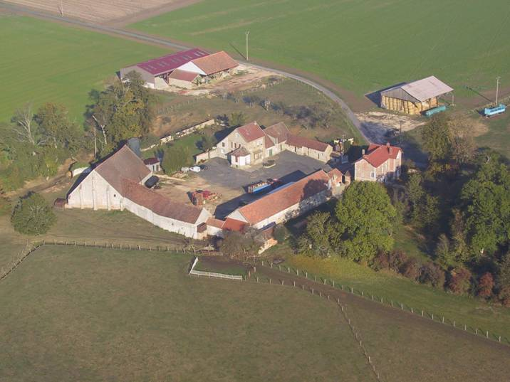 LA HAUTE MAISON - la ferme du mans vue du ciel